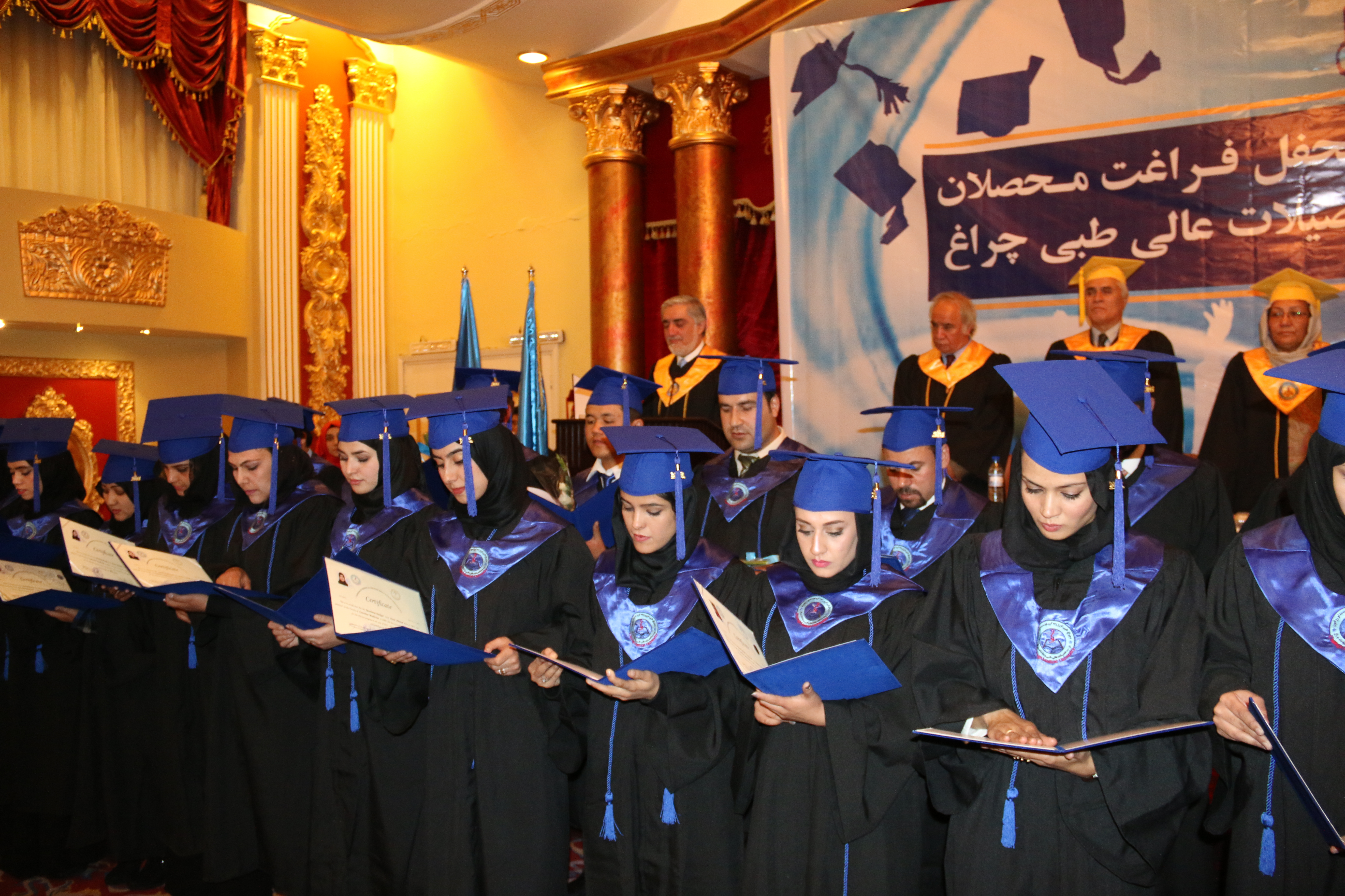 قرائت سوگندنامه مسلکی طبی توسط رییس اجراییه کشور کشور برای داکتران جوان